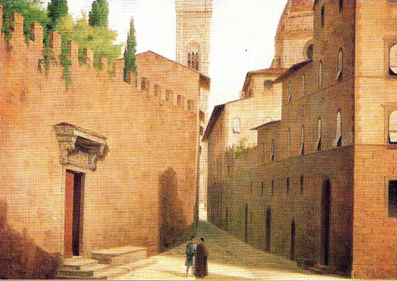 Via Buia